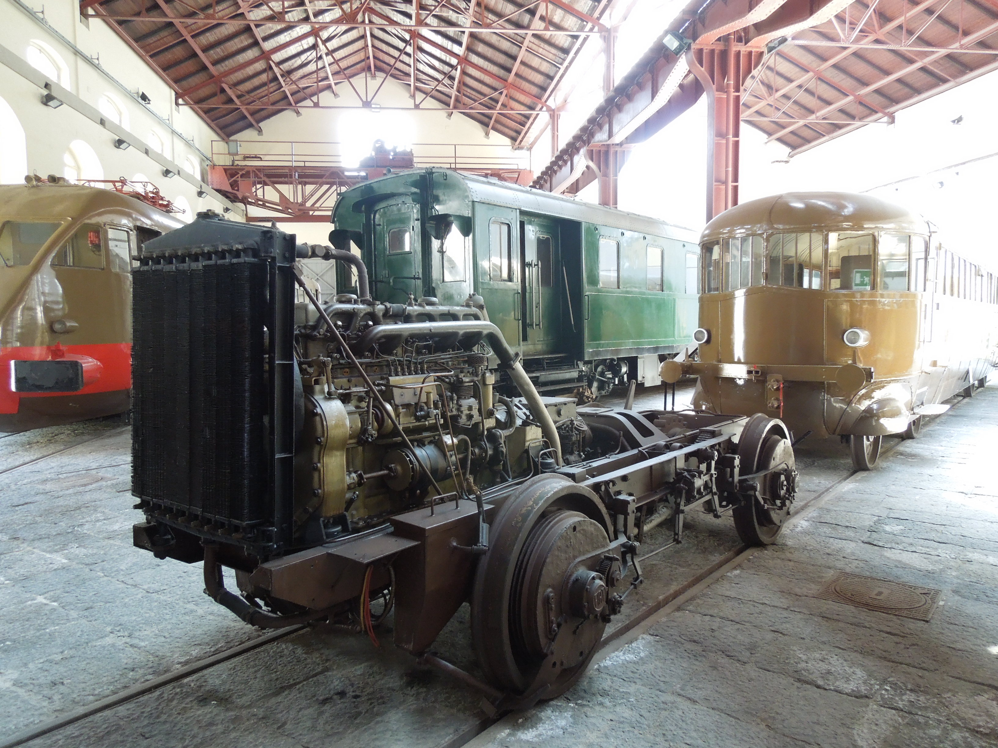 A Pietrarsa vasúttörténeti múzeum